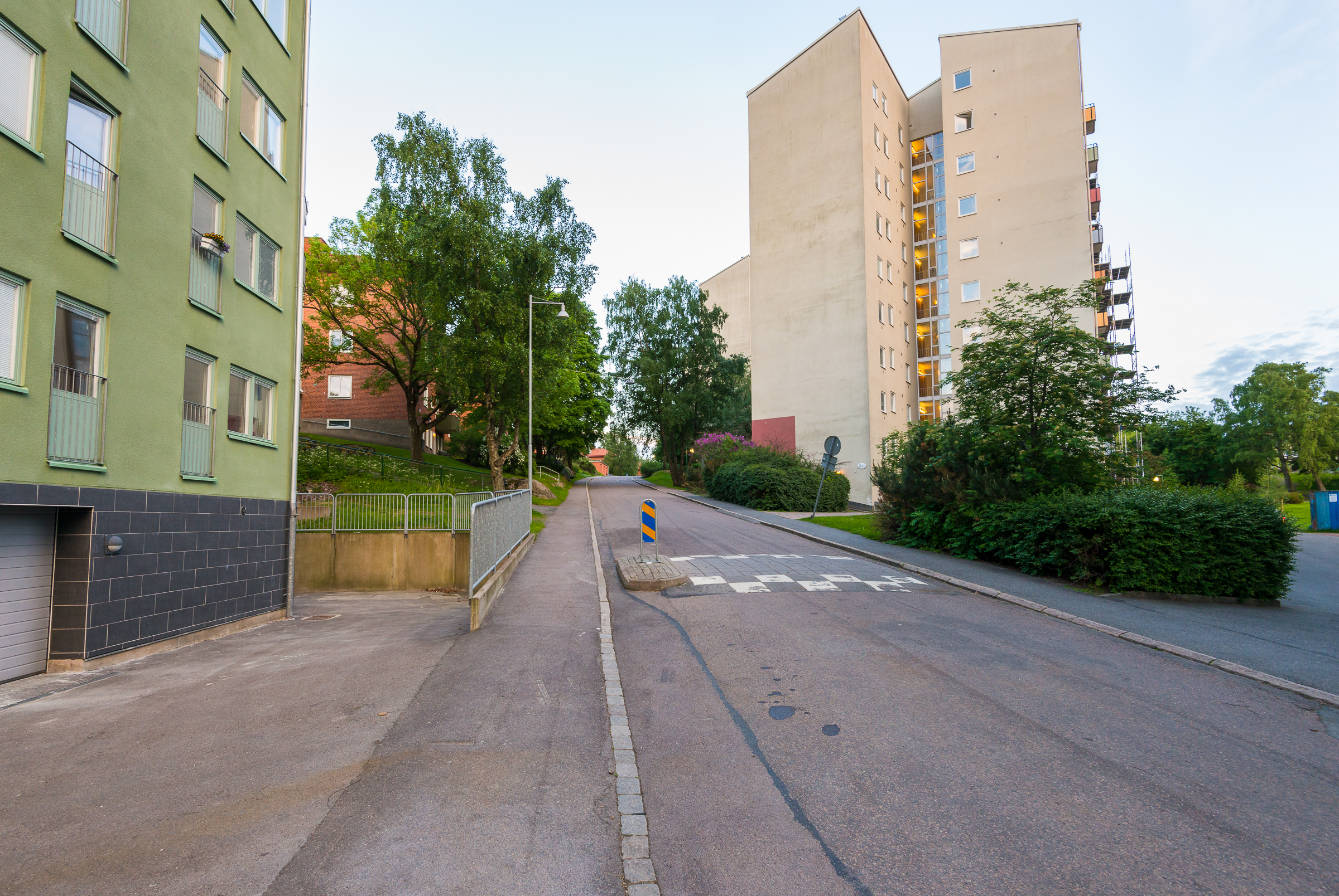 Doktor Liborius gata, juni 2013.